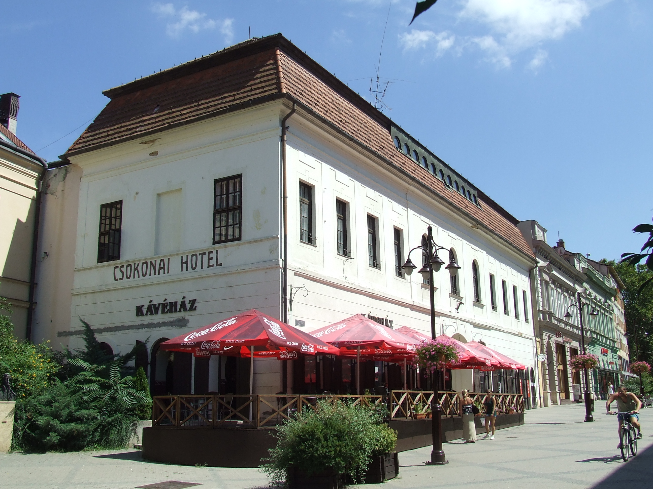 A Dorottya-ház Kaposváron This is a photo of a monument in Hungary, Identifier: 7915